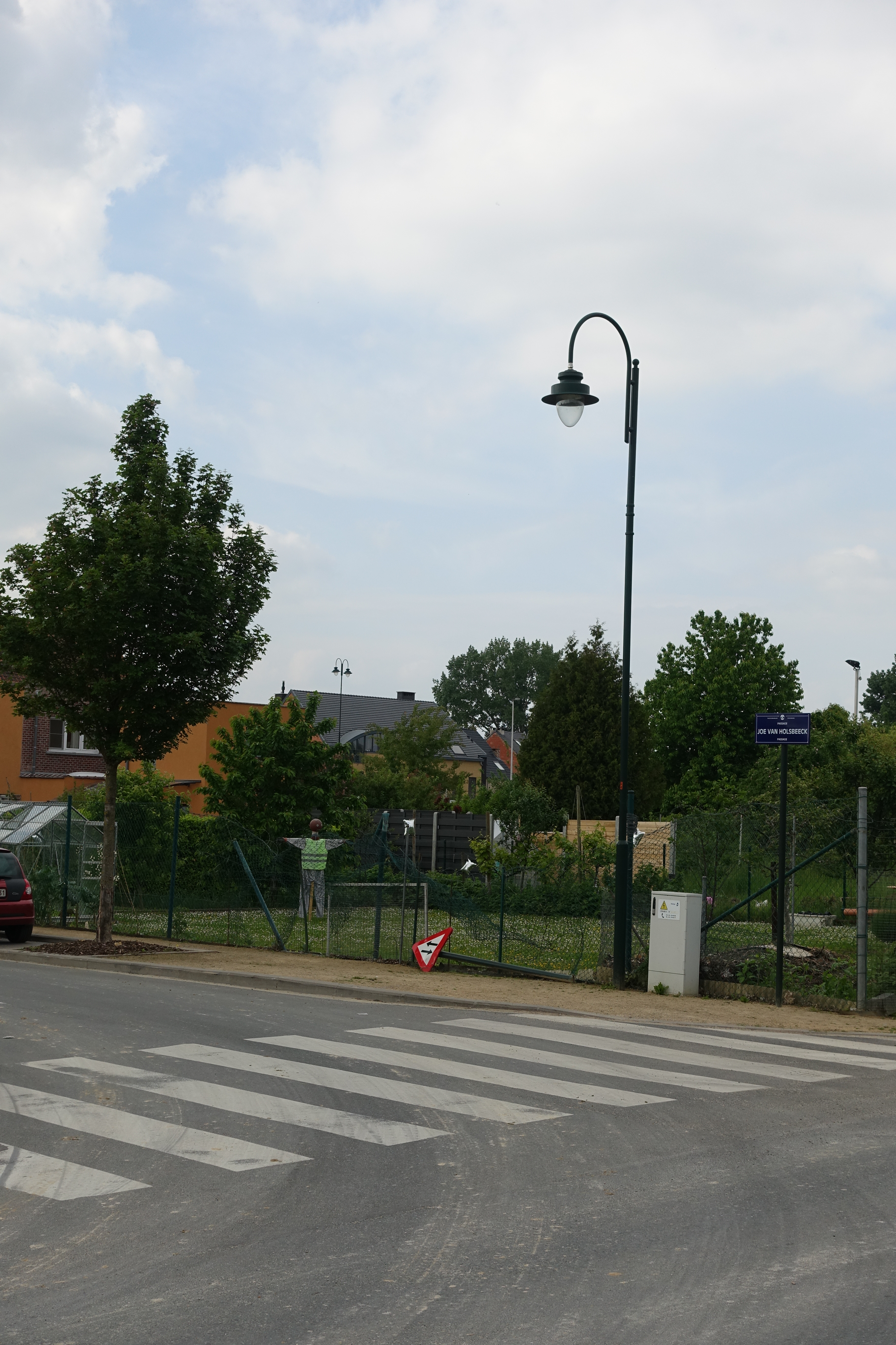 Joe Van Holsbeeckpassage in Haren. Moord op Joe Van Holsbeeck